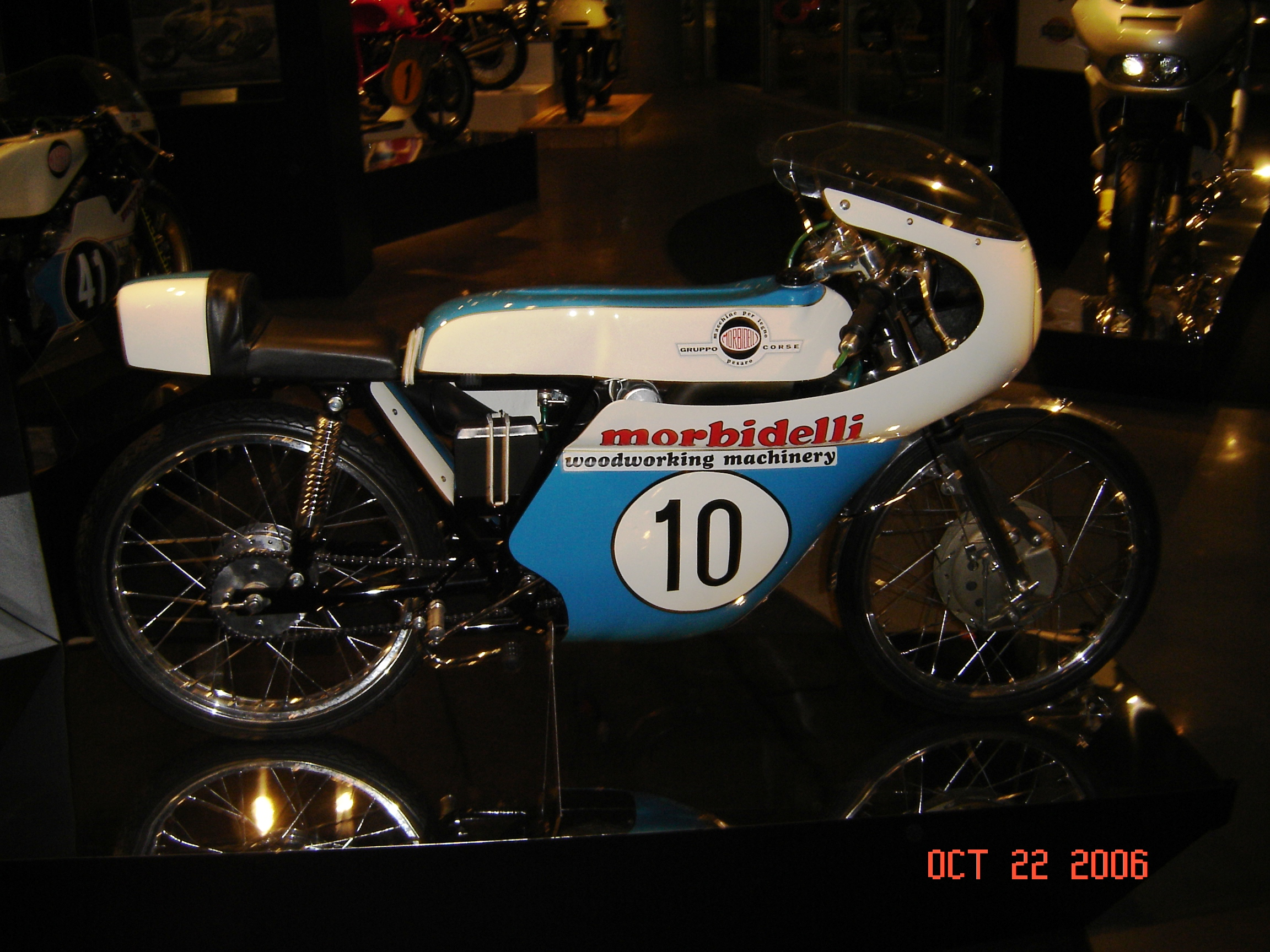 Barber Museum 10-22-2006 061 1971 Morbidelli 50cc Grand Prix / More Description is here